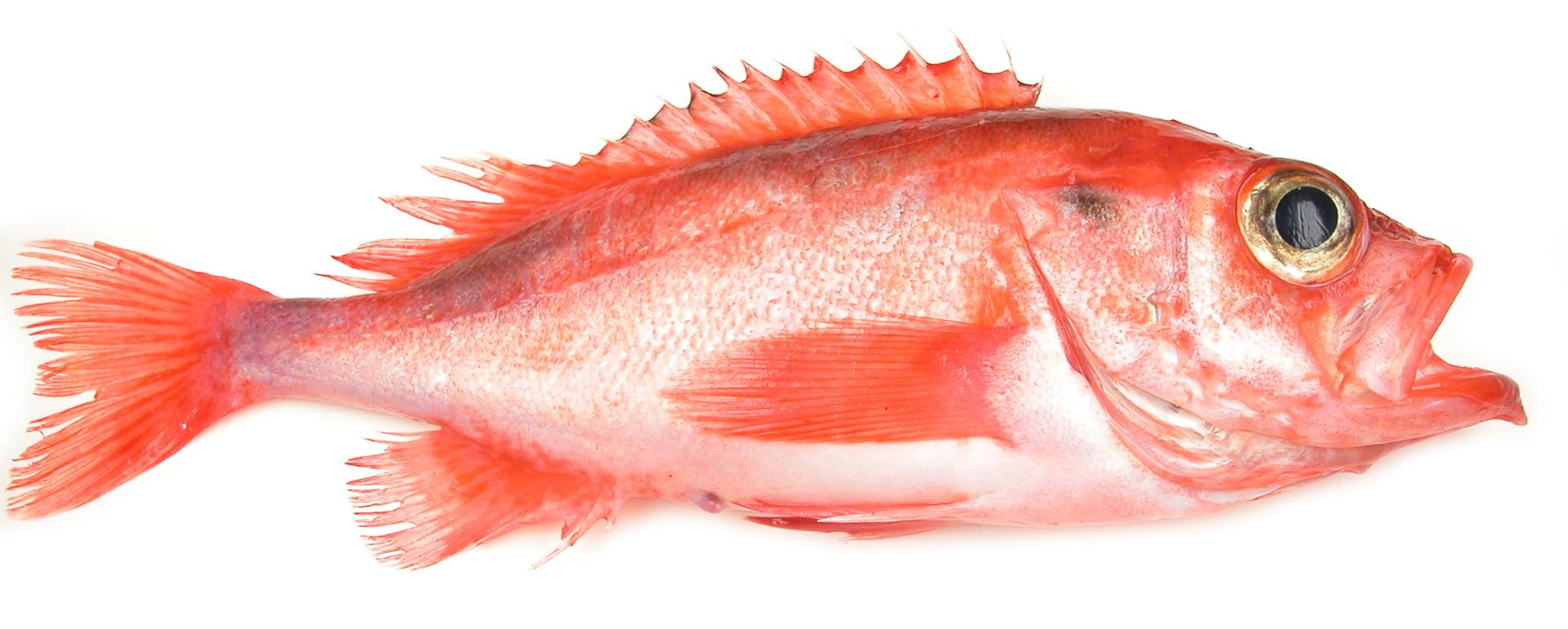 Sebastes mentella